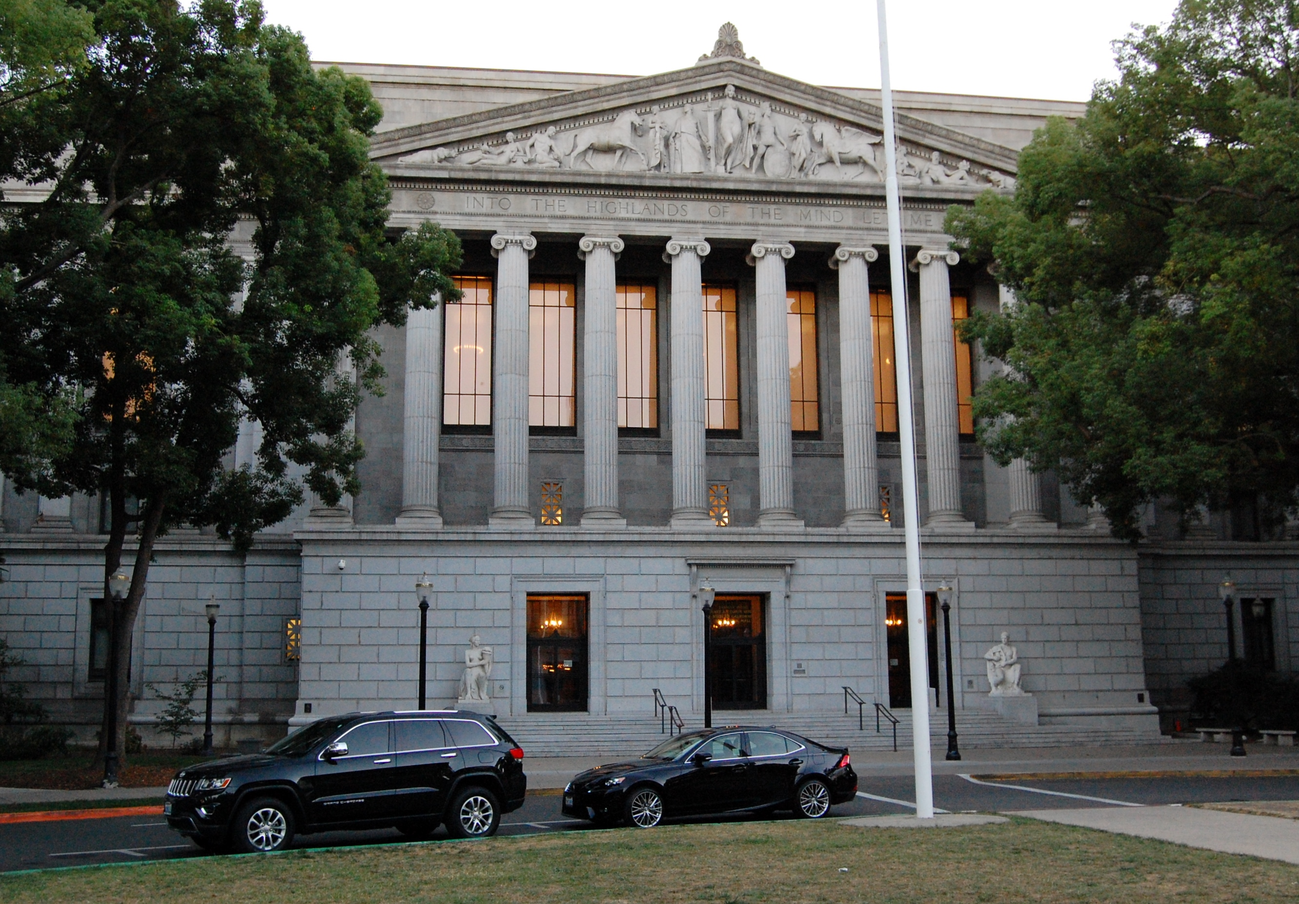 Central Sacramento, Sacramento, CA, USA